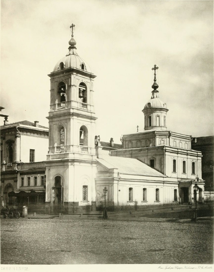 Казанский собор на Красной площади (разрушен). Фото 1882 года — вид храма до реконструкции 1925—1930 годов.